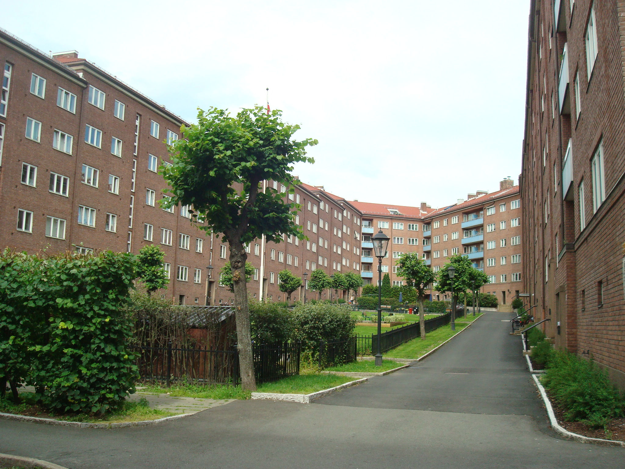 Engelsborg borettslag.